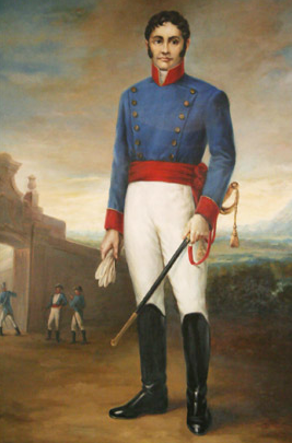 Procer de la Independencia Paraguaya